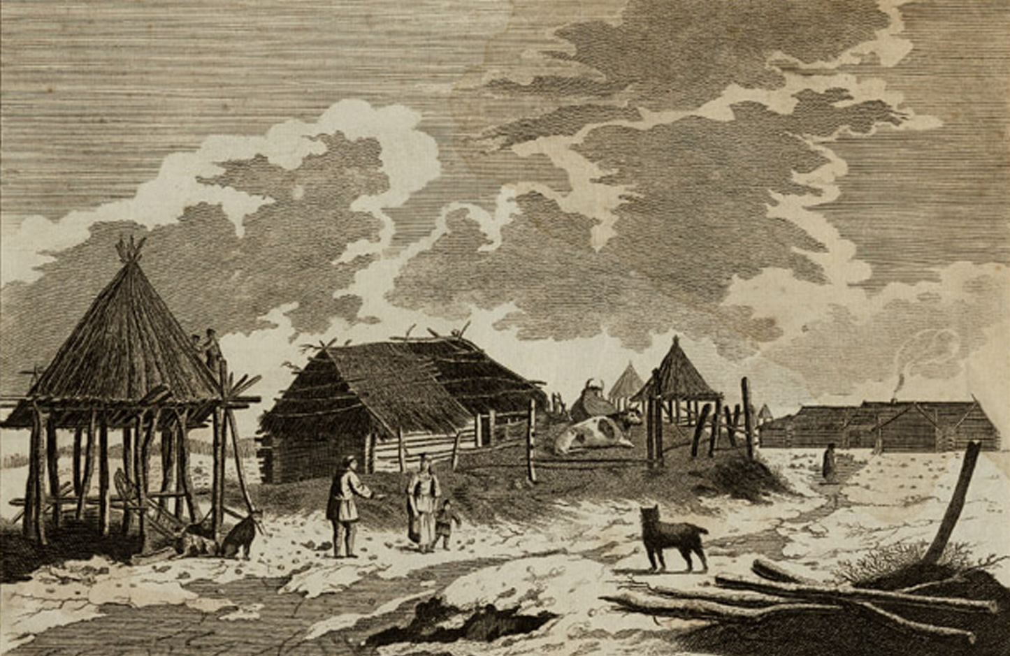 Вид на город Большерецк, столицу Камчатки